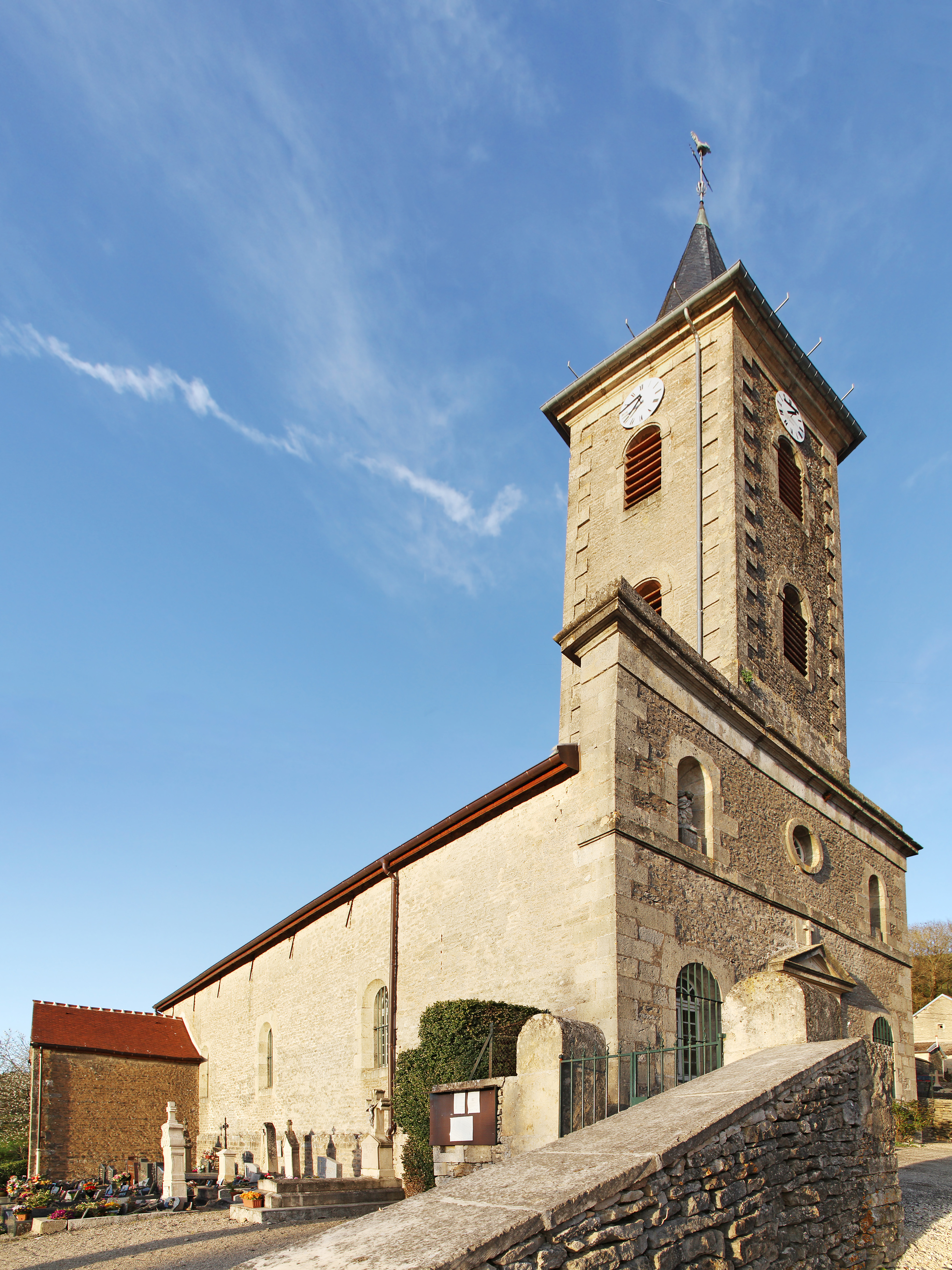 Église Saint-Pierre de Vaux-Saules